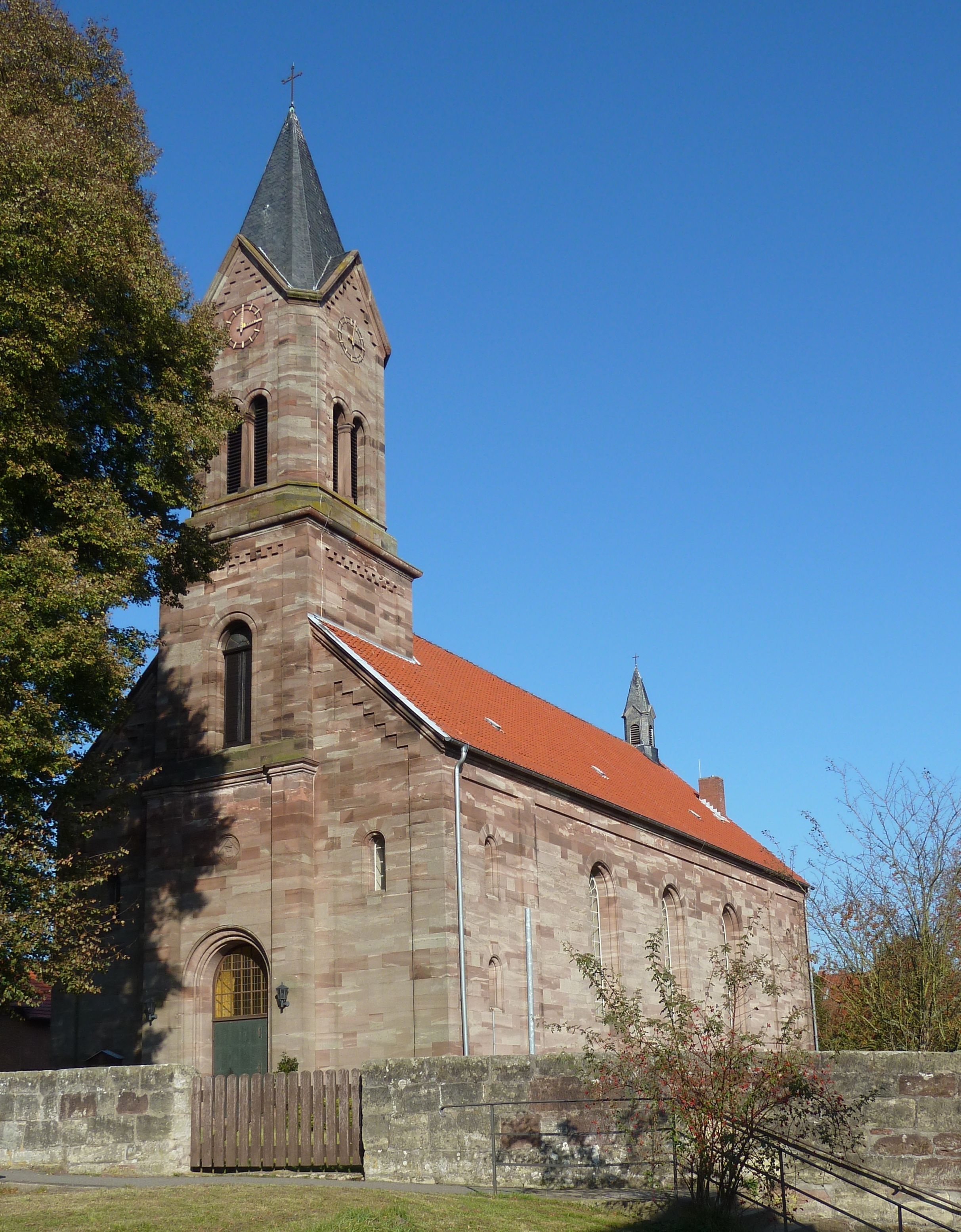 Südwestansicht der Wallfahrtskirche Mariä Geburt in Renshausen, Gemeinde Krebeck, Untereichsfeld. Erbaut 1847-1850, Entwurf: Landbaumeister Oldendorp